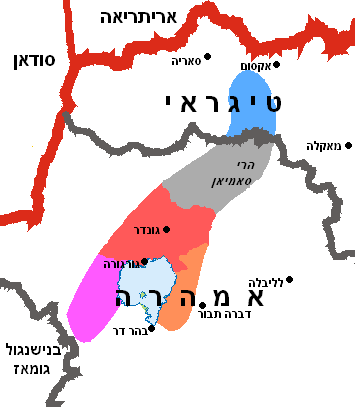 Kehillot Beta Israel